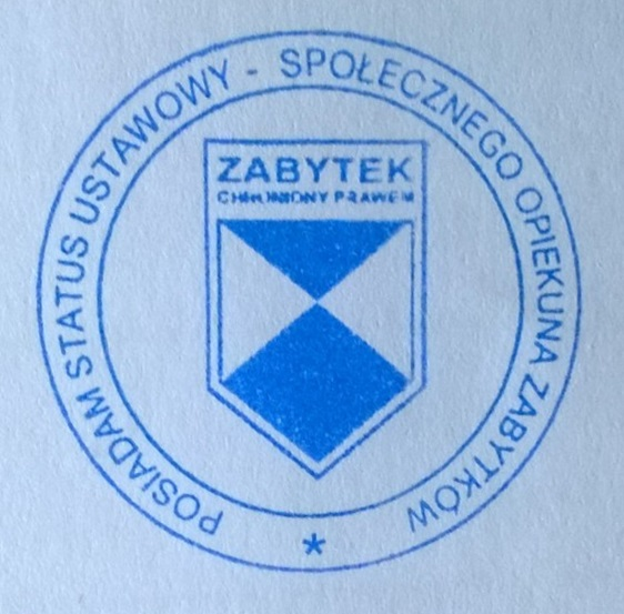 Pieczęć potwierdzająca uzyskanie Społecznego Opiekuna Zabytków